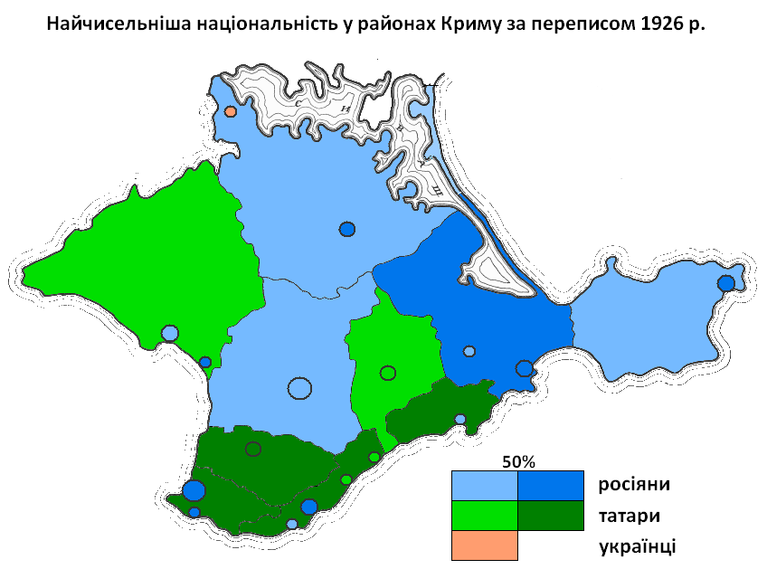 Найчисельніша національність у районах та містах Криму за даними перепису 1926 р.